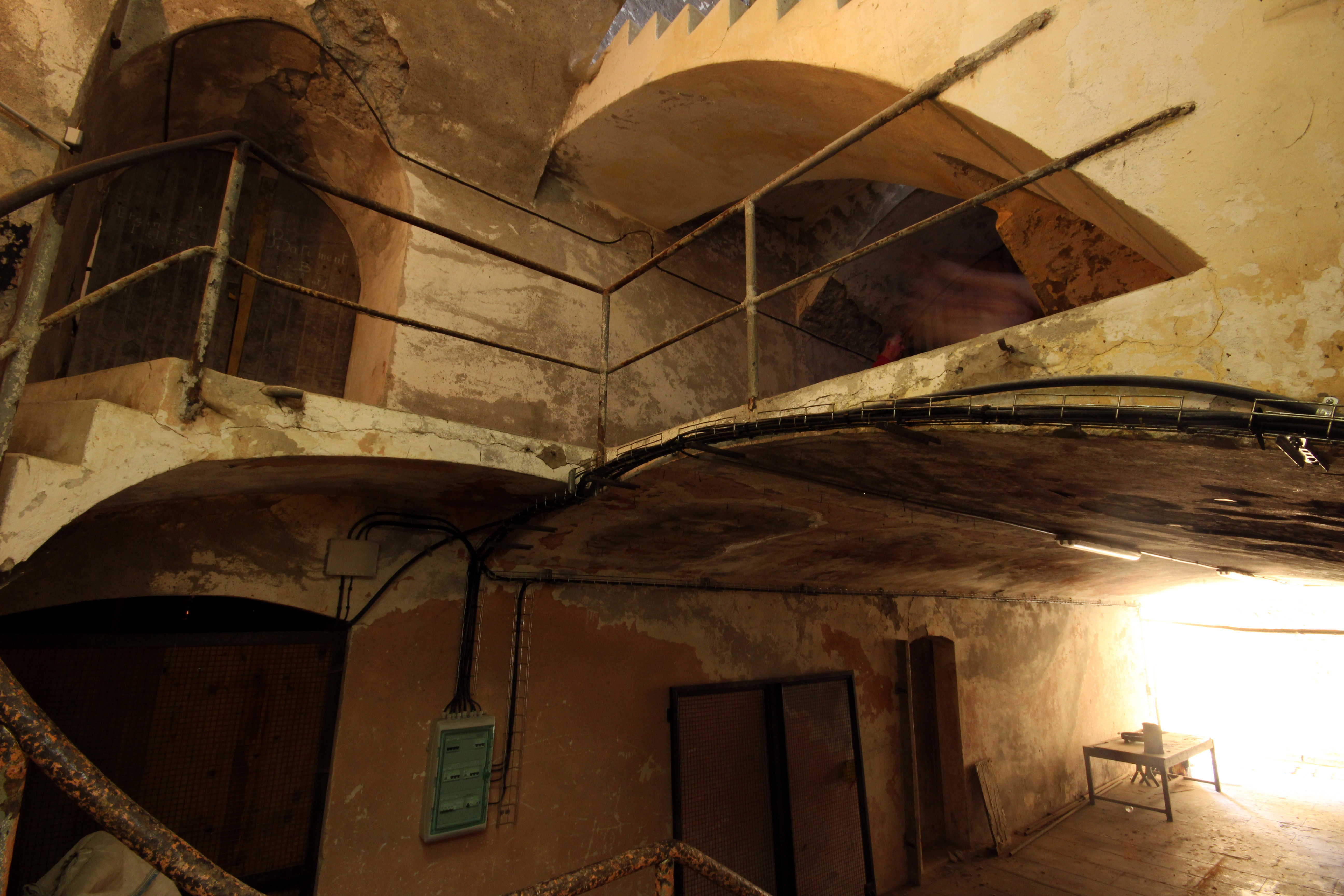 Détail d'un escalier qui même à une traverse du fort du Mont